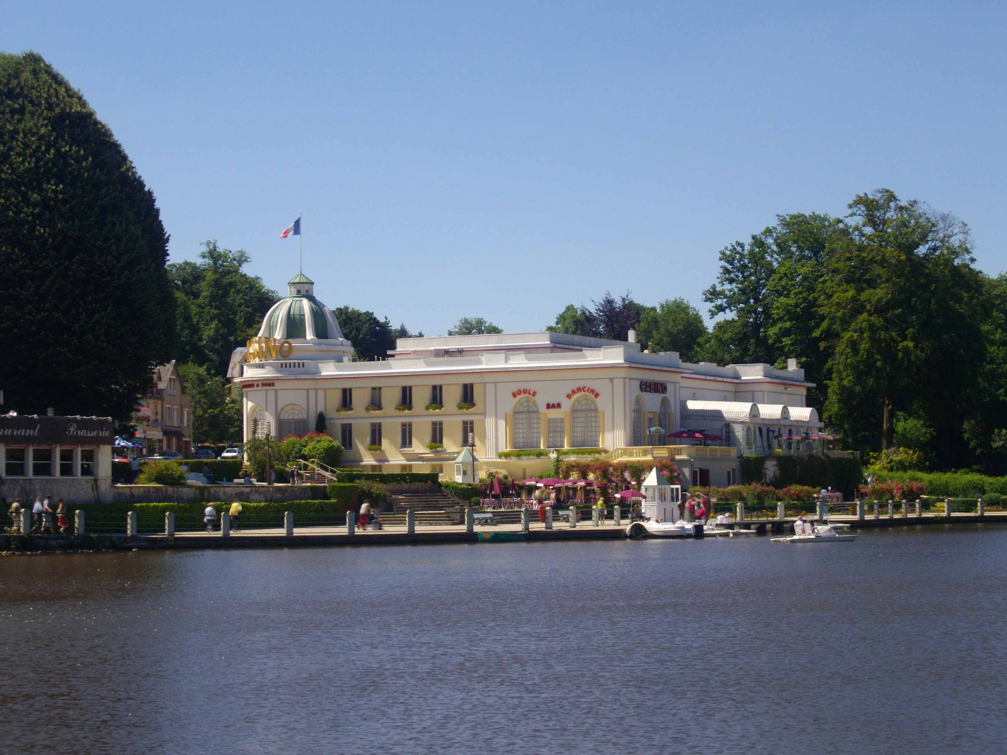 Casino et Lac de Bagnoles-de-l'Orne (Basse-Normandie, France)